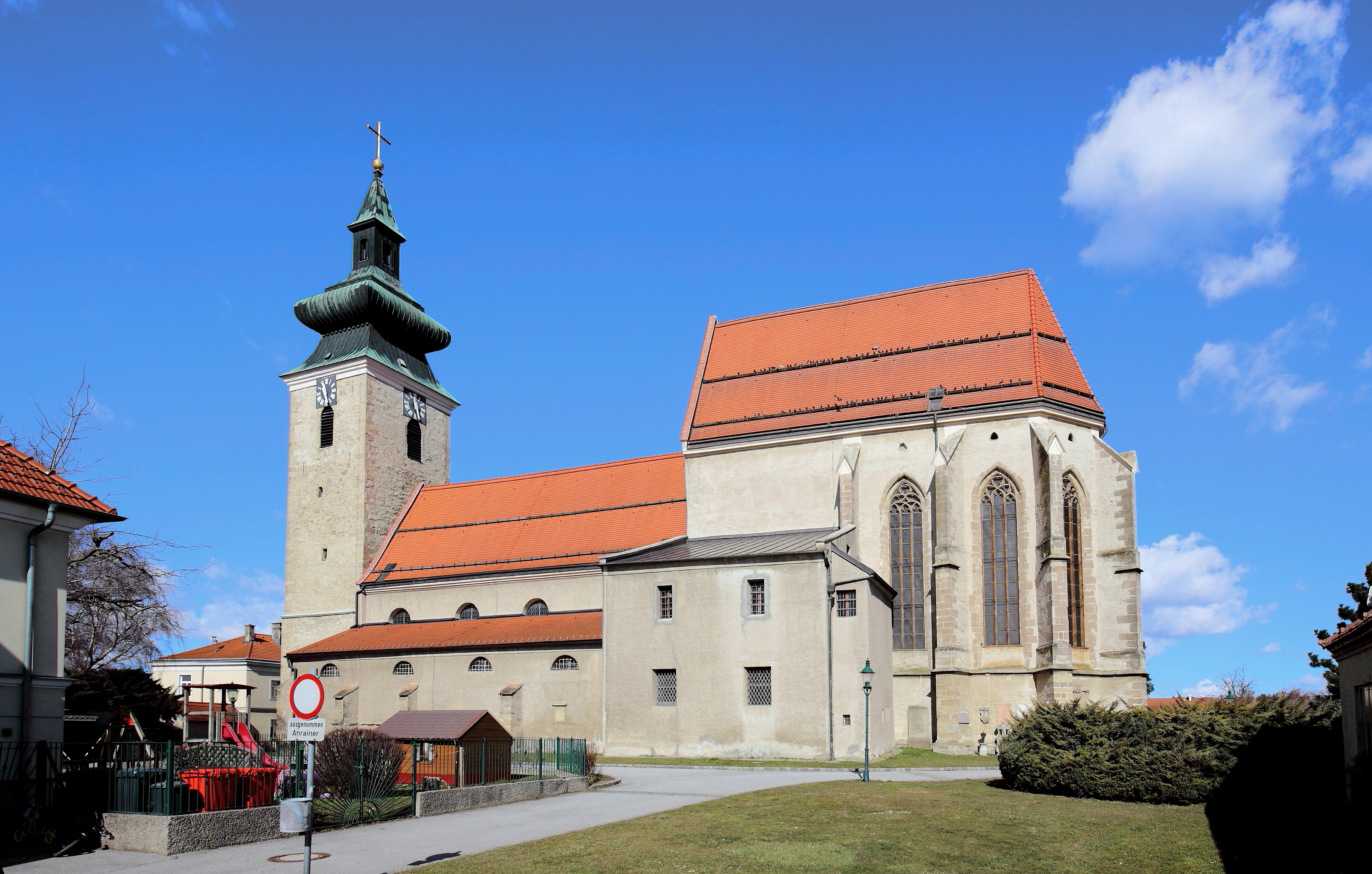 Südansicht der katholischen Pfarrkirche hl. Martin in der niederösterreichischen Marktgemeinde Pillichsdorf. Eine im Kern romanische und barockisierte Pfeilerbasilika (1. Hälfte des 13. Jahrhunderts und um 1340 gotisiert) mit hohem gotischen Langchor (um 1420) und freistehendem mächtigen spätgotischen Westturm (um 1510).